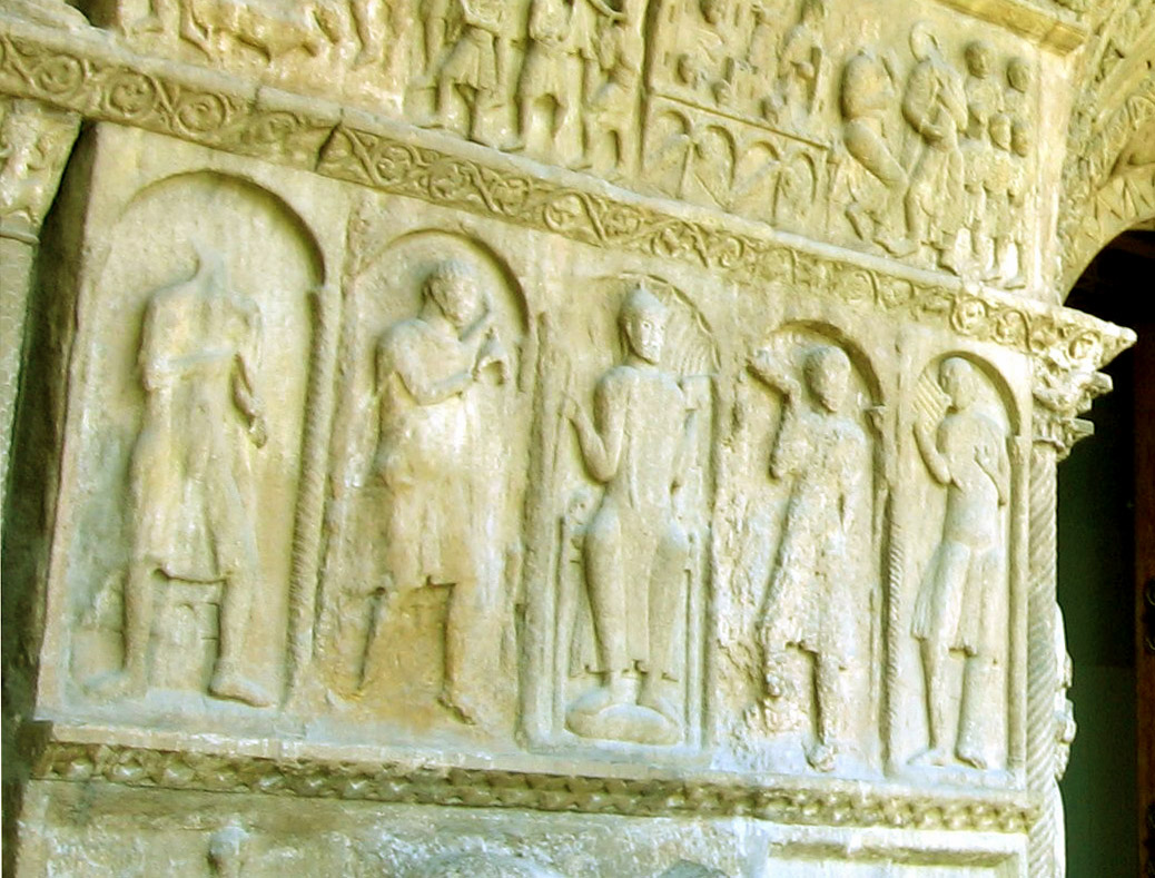 Detalle del pórtico de Santa María de Ripoll